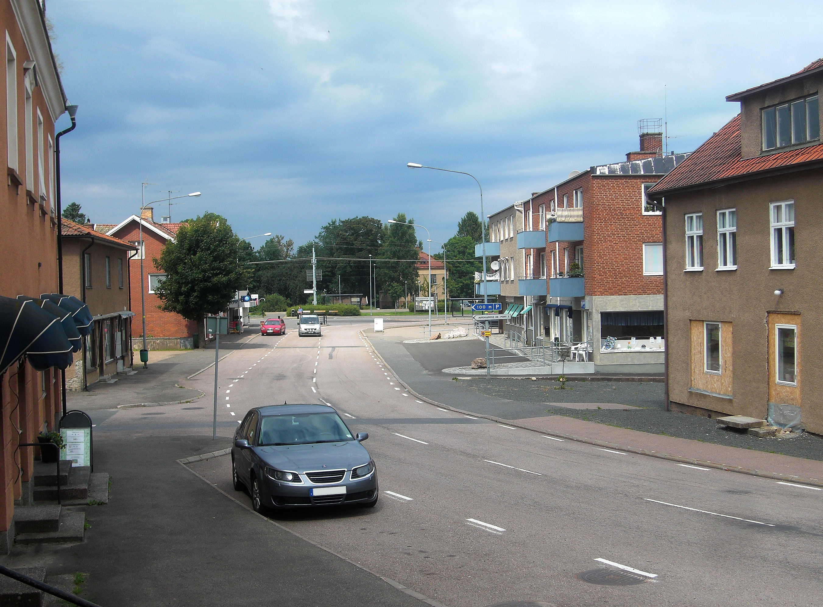 Köpmansgatan i Floby samhälle, Floby socken, Vilske härad, Falköpings kommun. f.d. Skaraborgs län, Västergötland, Västra Götalands län, Sverige. Den parkerade bilen närmast kameran är en grå SAAB 9-5 Linear av årsmodell 2008.